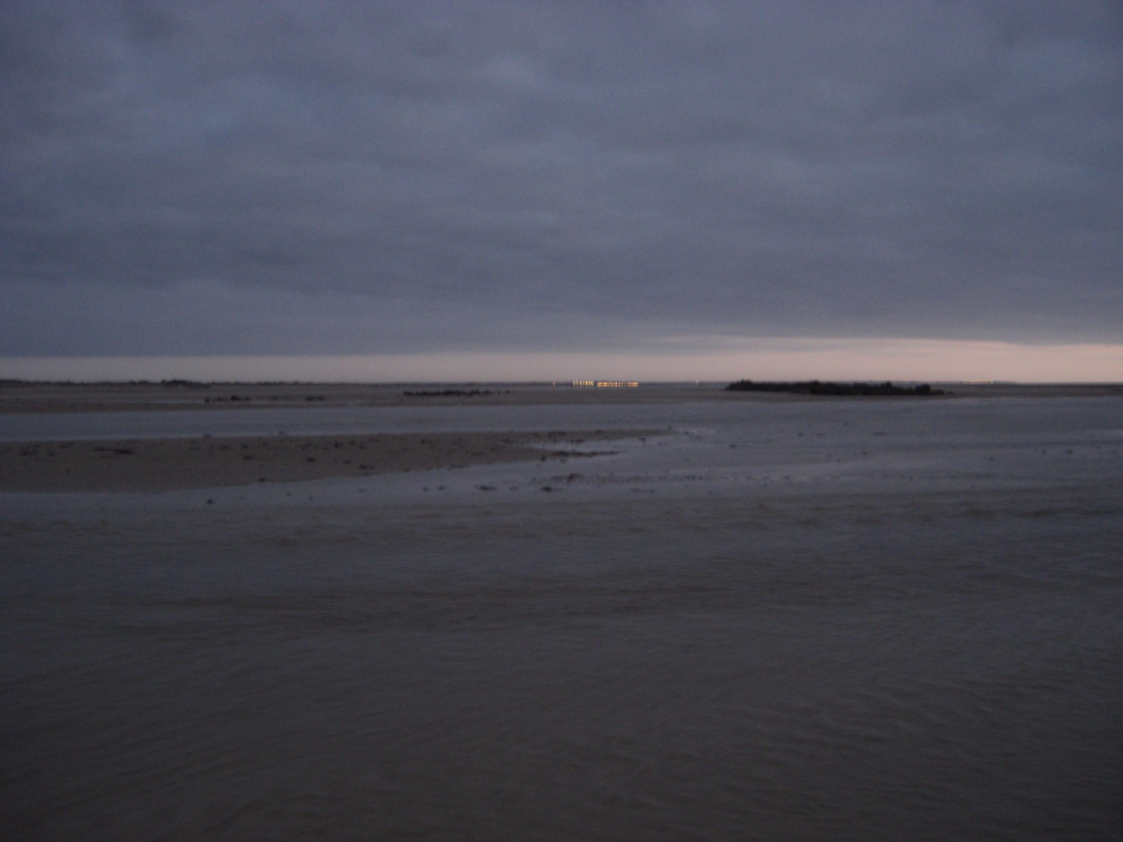 photographie du Passage de la Gaule à marée prise à Saint-Germain-sur-Ay avec vue sur les lumières de Créances et de Pirou. Ce Passage fut emprunté par 437 réfugiés du 18 au 21 juillet 1944 pour passer en France Libérée par les Américains. Ce passage était tenu par le 106e de cavalerie du Texas.